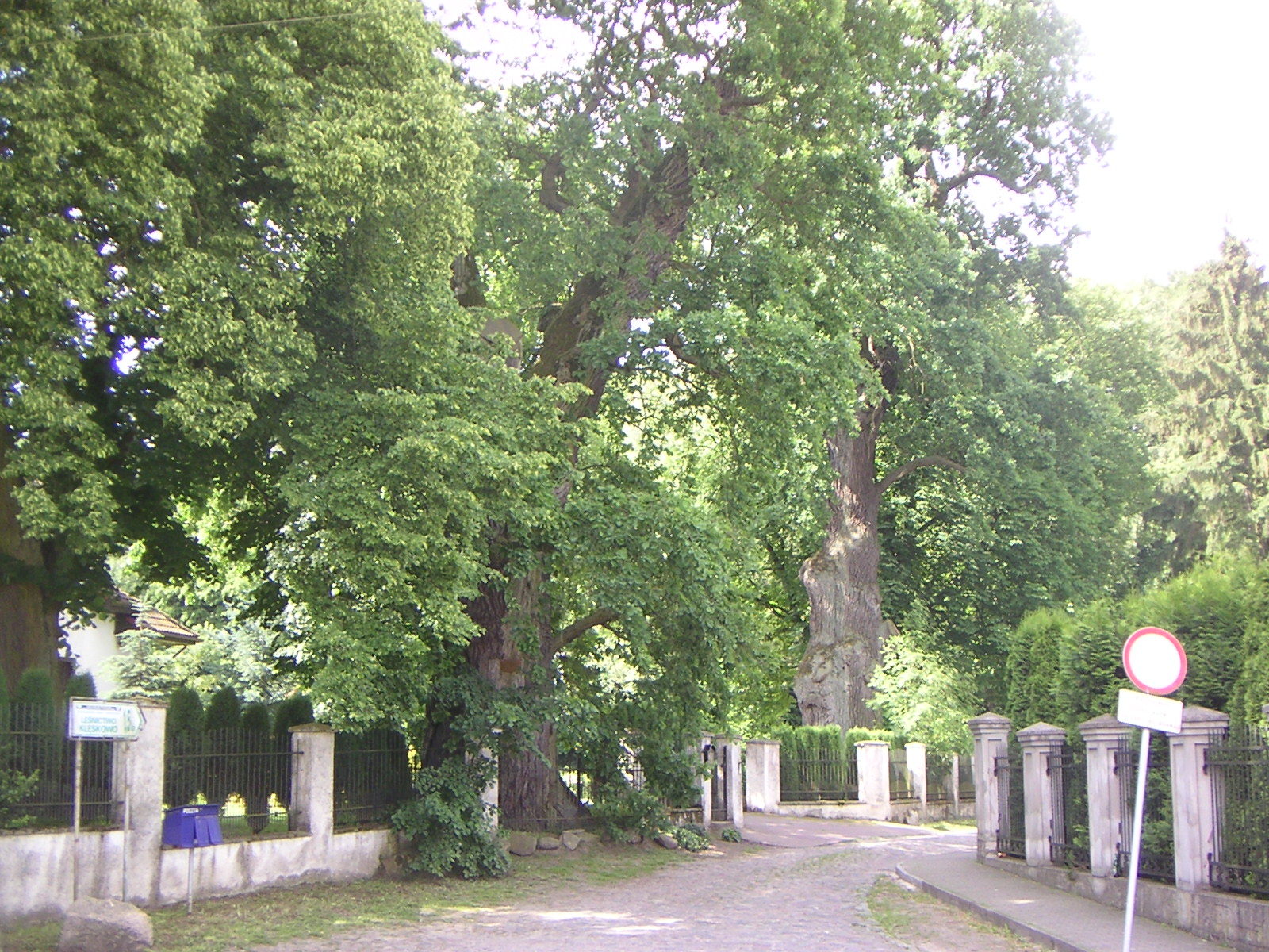 Szczecin-Klęskowo, pomnik przyrody "Dęby Bolesława Krzywoustego", widok z ul. Chłopskiej w kierunku zachodnim